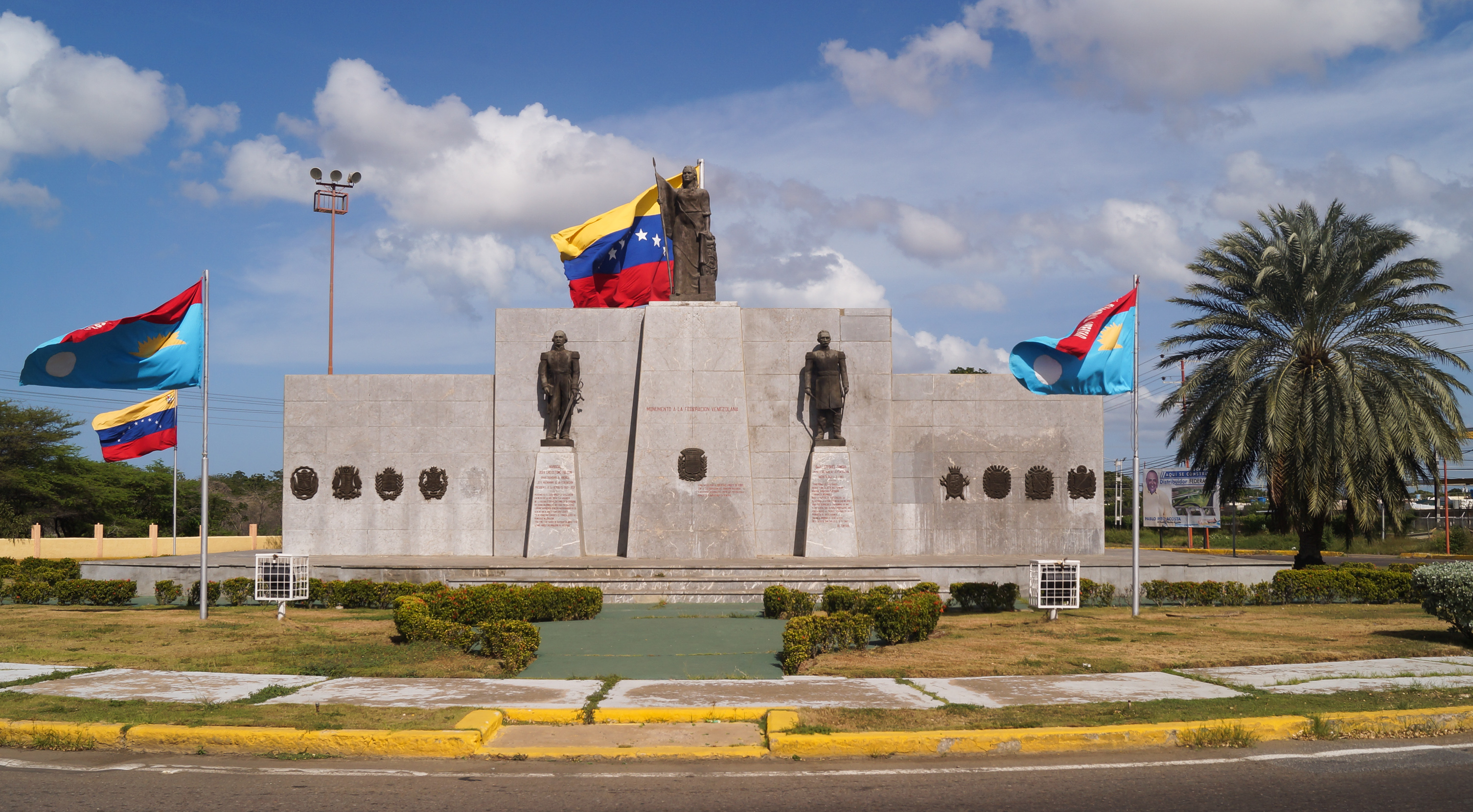 Se encuentra ubicado en la Redoma Avenida Los Medanos y Pinto Salinas. Conjunto formado por una estructura o base de concreto cubierta con losas marmolizadas, al cual se accede a través de tres escalones. En la parte central del monumento destaca la escultura que representa a la heroína falconiana Josefa Camejo y a ambos lados las esculturas del mariscal Juan Crisóstomo Falcón y el general Ezequiel Zamora. La imagen central del monumento está representada de pie, sosteniendo la bandera en su brazo derecho y apoyando su mano izquierda sobre un escudo. Las escultura del general Ezequiel Zamora, también representado de pie, viste traje con charreteras y fajín en relieve, en su mano derecha sostiene la espada y con la izquierda la vaina. El mariscal Falcón está representado con traje militar, sostiene en su mano derecha un libro y en la izquierda una espada. Estas dos últimas imágenes están colocadas sobre pedestales de inclinación vertical en los cuales se lee la identificación de los mismos. En la parte posterior del monumento, sobre una base de concreto, está colocado un cañón, así como las astas de las banderas. Coro. Estado Falcón.